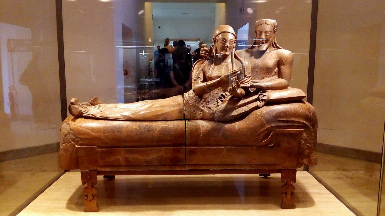 Museo nazionale etrusco di Villa Giulia This is a photo of a monument which is part of cultural heritage of Italy.